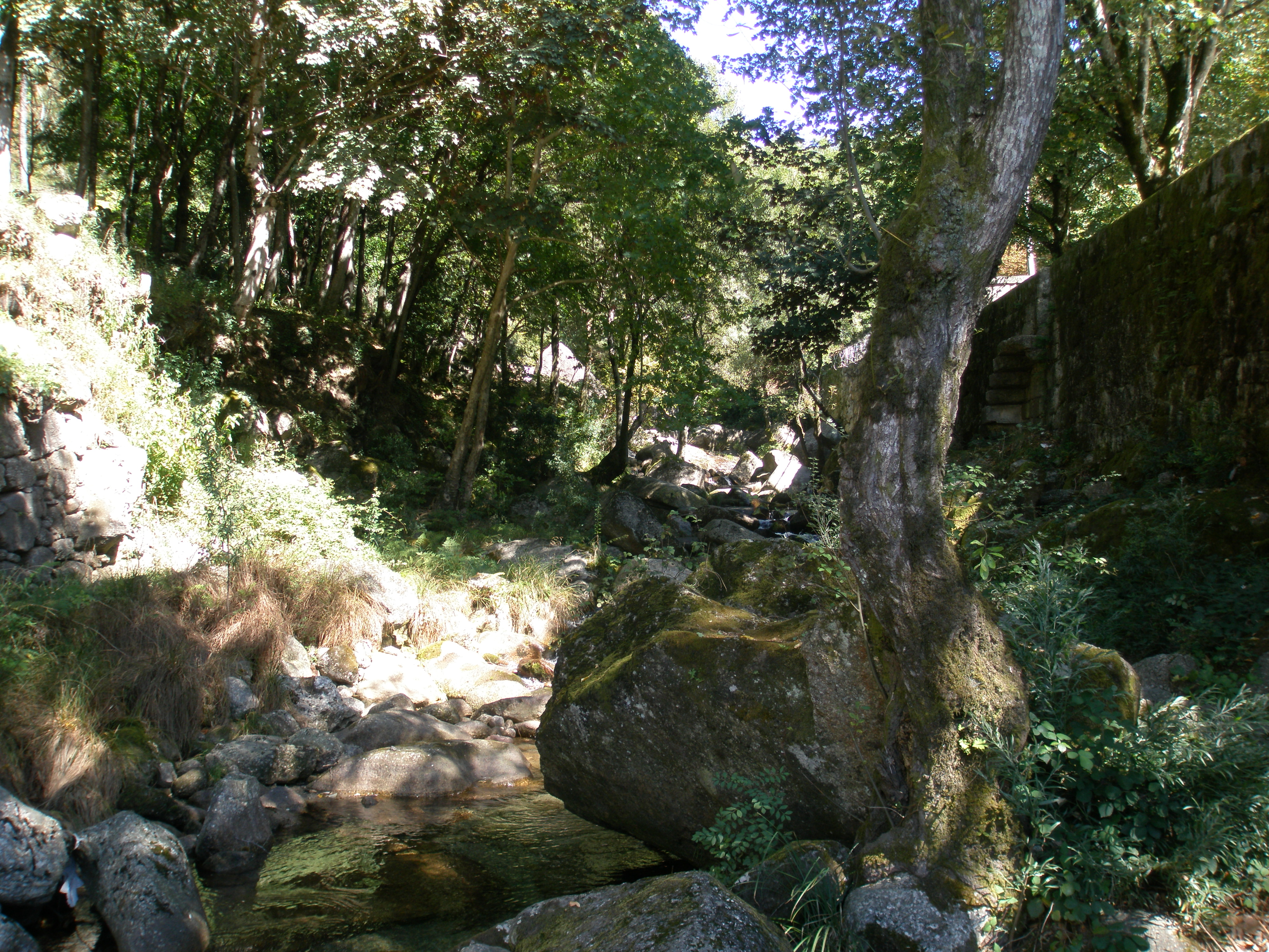 Rio Nava e a vegestação